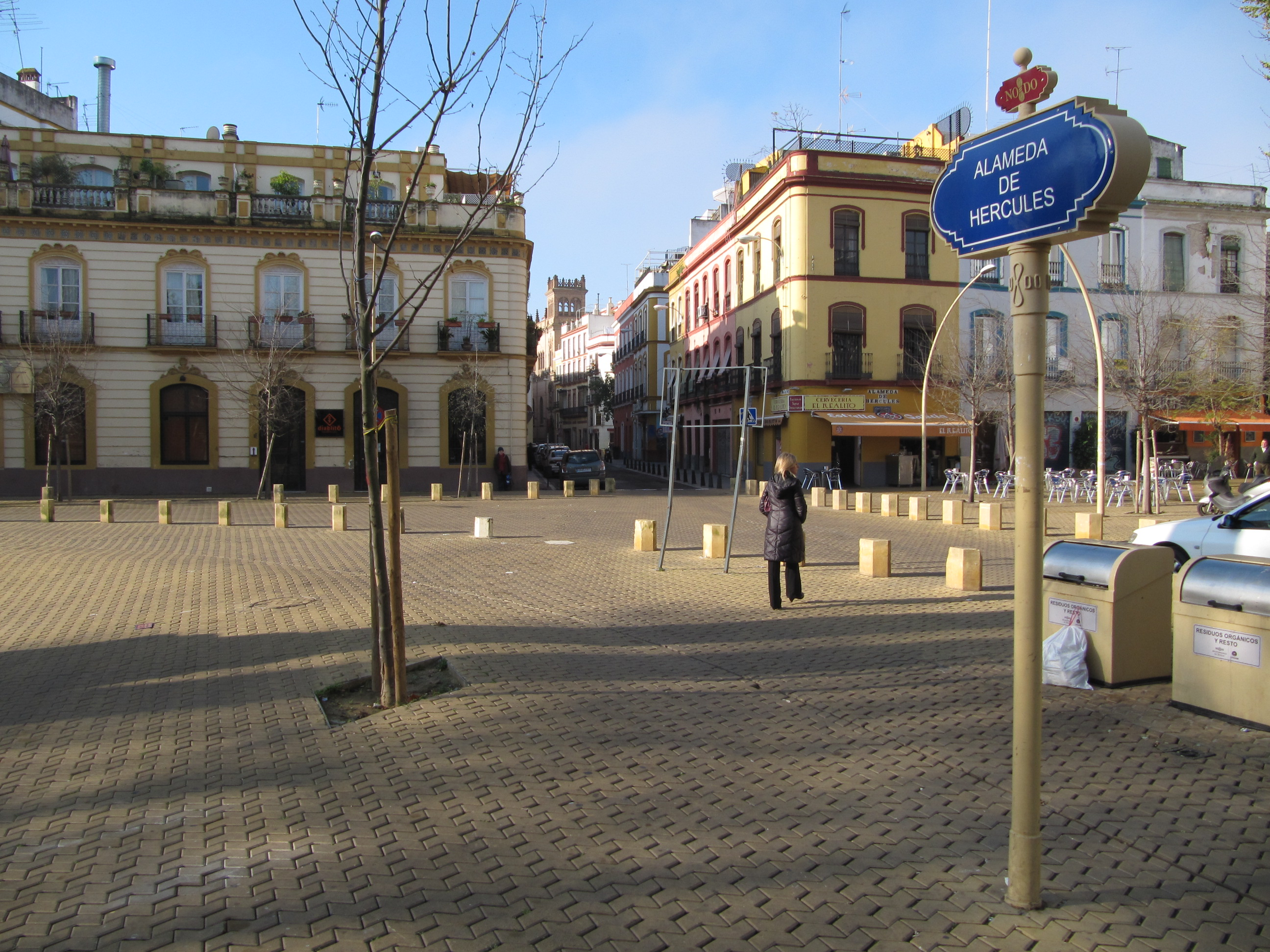 Sevilla - March 2011 - 073.jpg